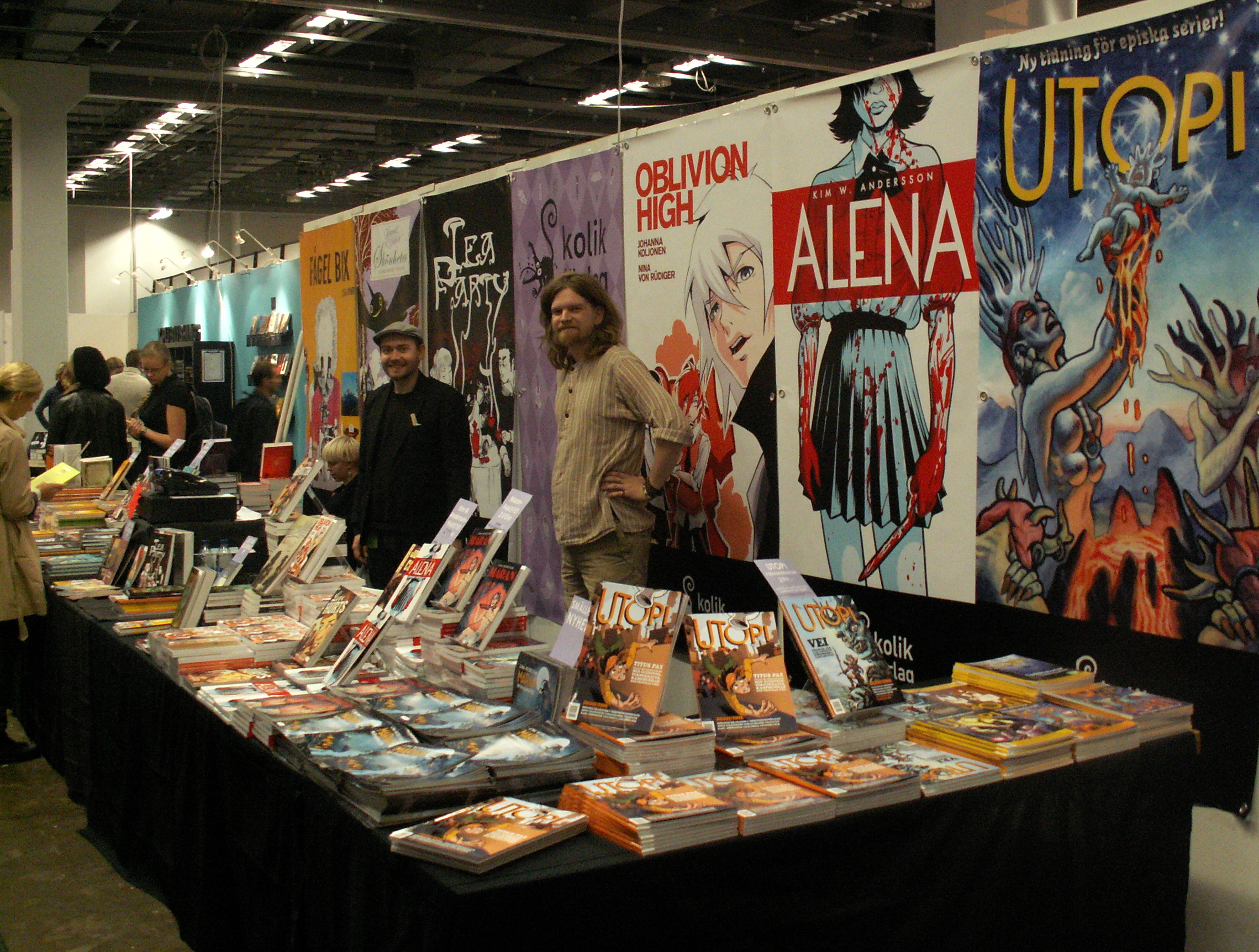 Kolik förlag på Bok & Bibliotek i Göteborg, september 2012. Sittande i montern: Josefin Svenske. Stående: Fabian Göranson och Henri Gylander.